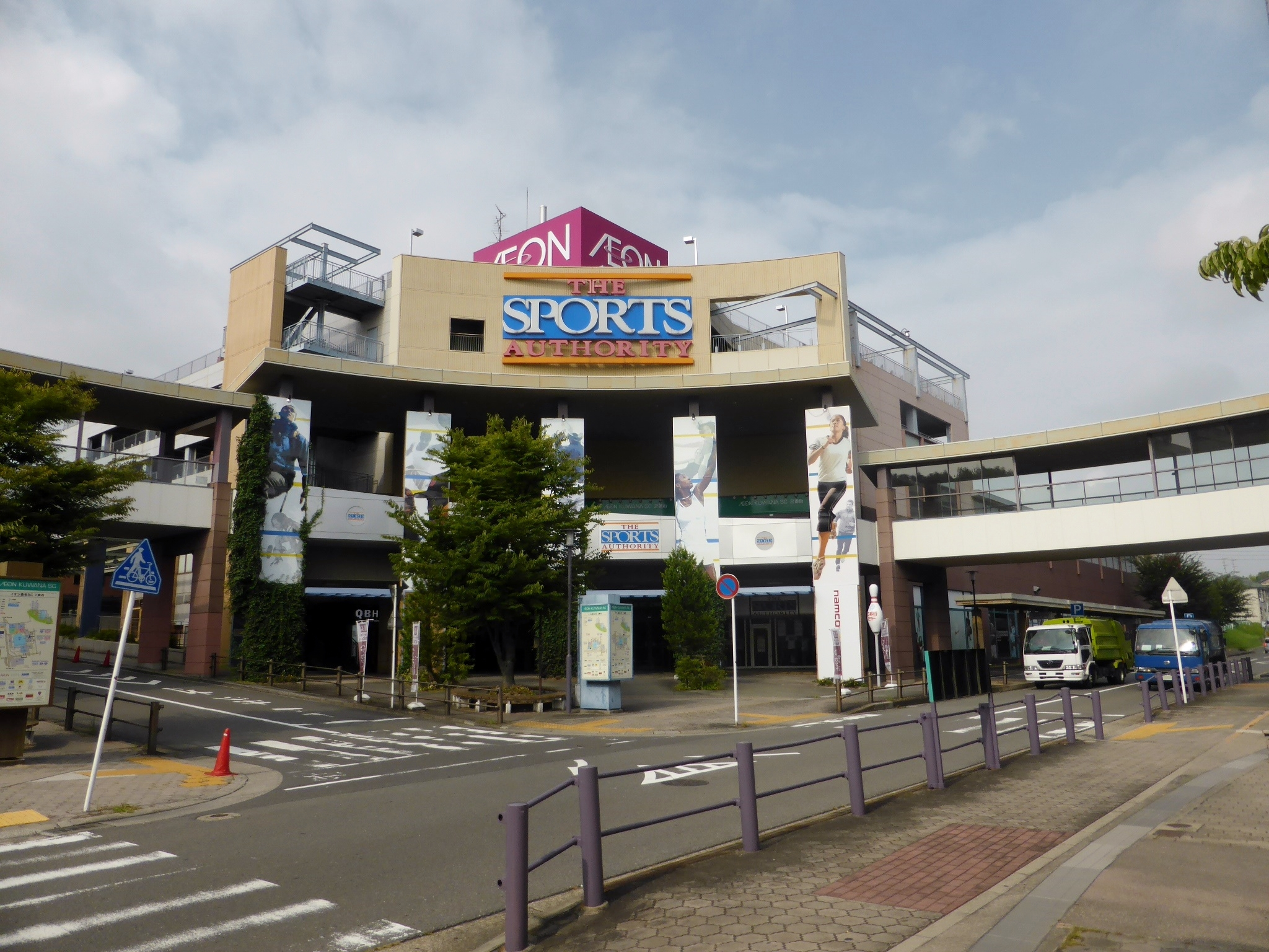 イオン桑名ショッピングセンター2番街を撮影